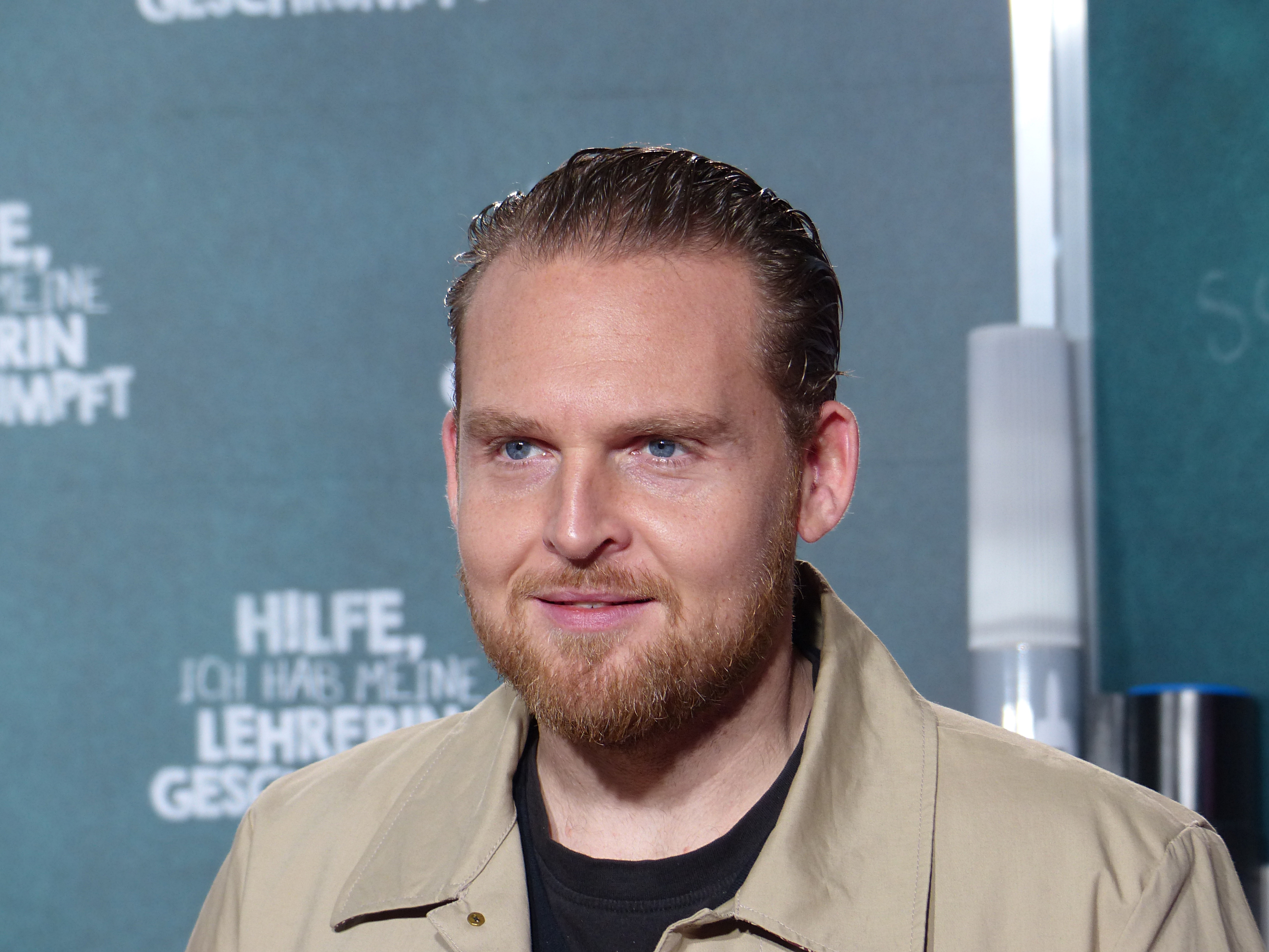 Axel Stein bei der Premiere von "Hilfe, ich habe meine Lehrerin geschrumpft", im Dezember 2015